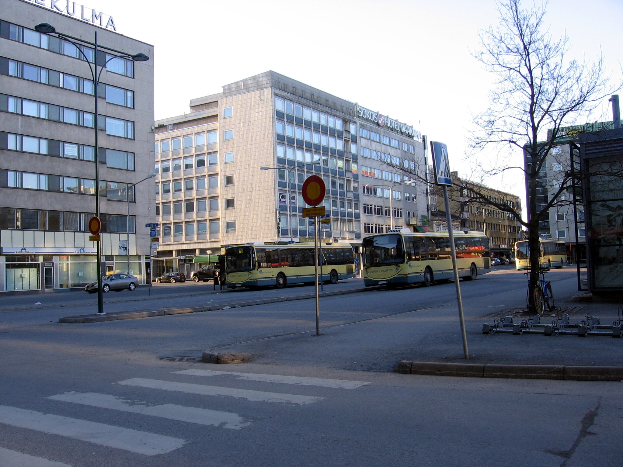 Porin Linjat